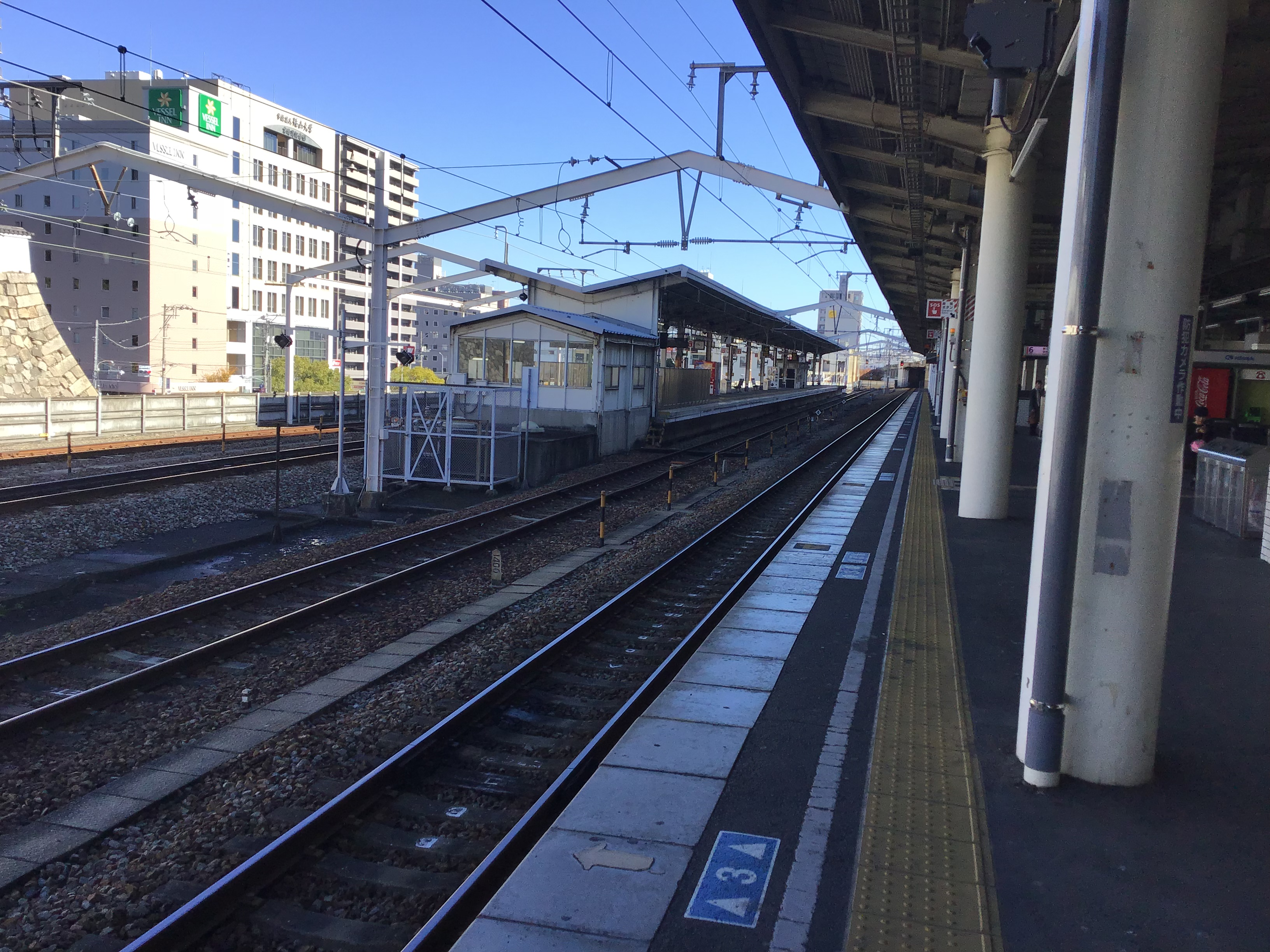 福山駅山陽線ホームより